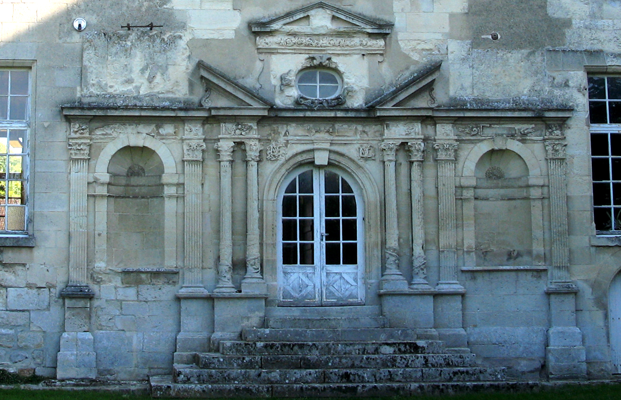 Oulchy-le-Château (Aisne, France) - Détail de la façade Ouest de l'ancien prieuré, juste à gauche de l'église. . . .